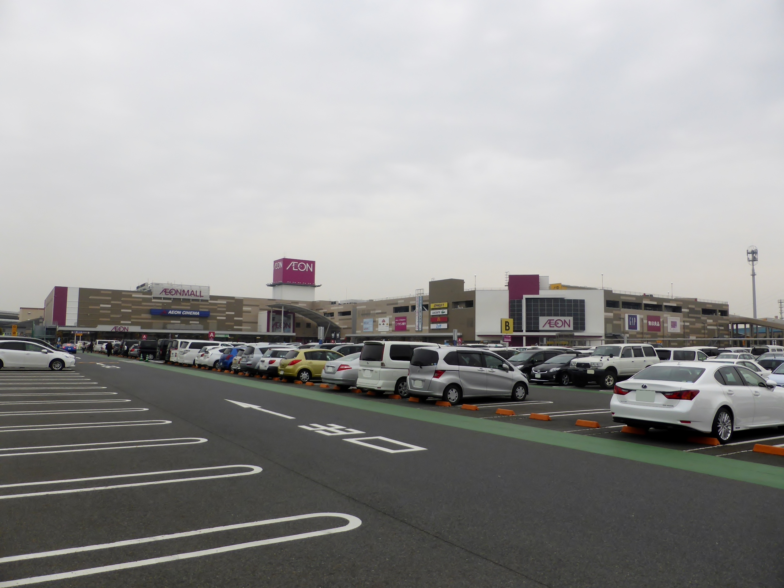 イオンモール久御山を撮影。